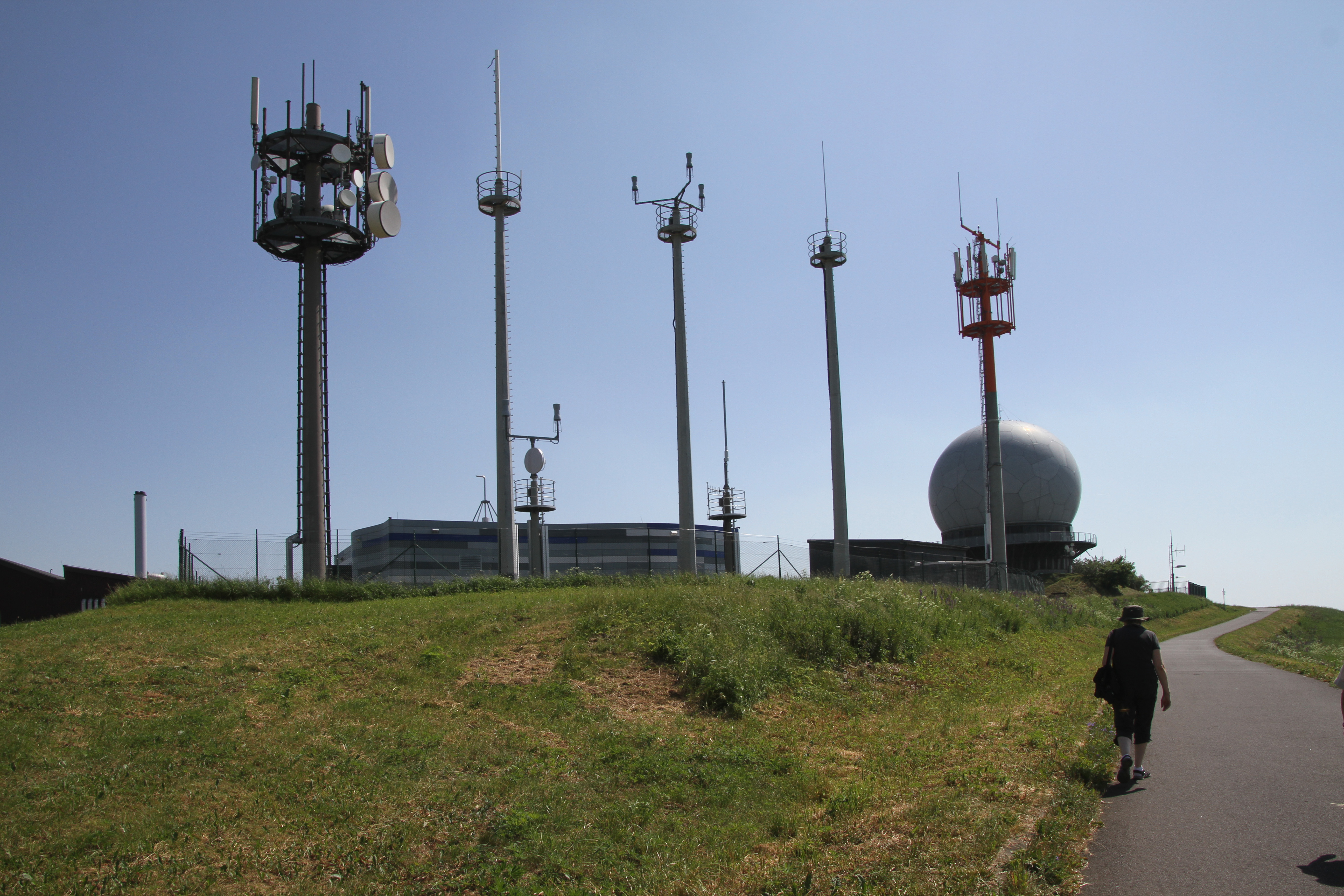 Wasserkuppe in der Rhön in Hessen